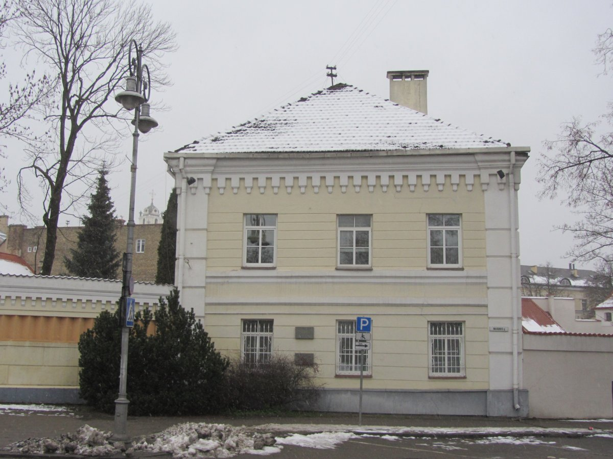 Вільня (Вільнюс). Maironio, 13 на першым паверсе здымаў кватэру і Рыгор Шырма. Дарэчы, будынак пабудаваны па праекце Лявона Вітан-Дубейкаўскага